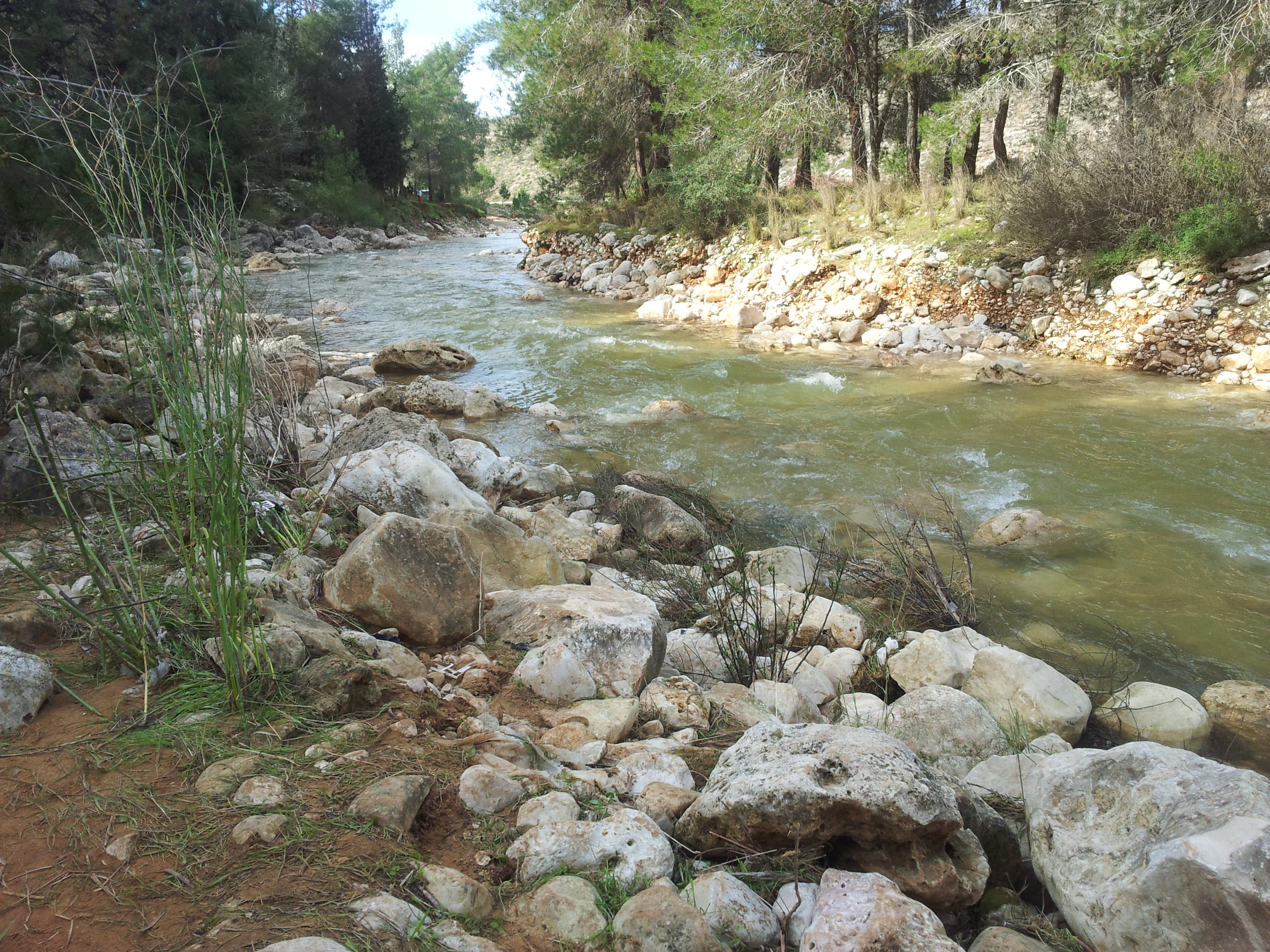 צילום של ואדי מודיעין בחורף 2013